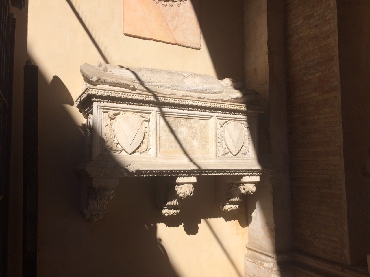 Tomba di Bonetto Da Castelfranco collocata nella parete di fondo sinistra dell'esterno della chiesa di San Francesco a Fano